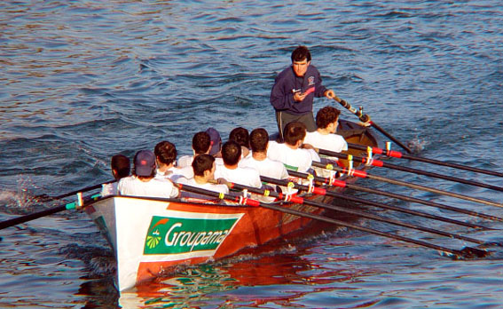 Trainière du club Ur Joko de Saint-Jean-de-Luz (Pyrénées-Atlantiques) lors de la descente de l'Orio.